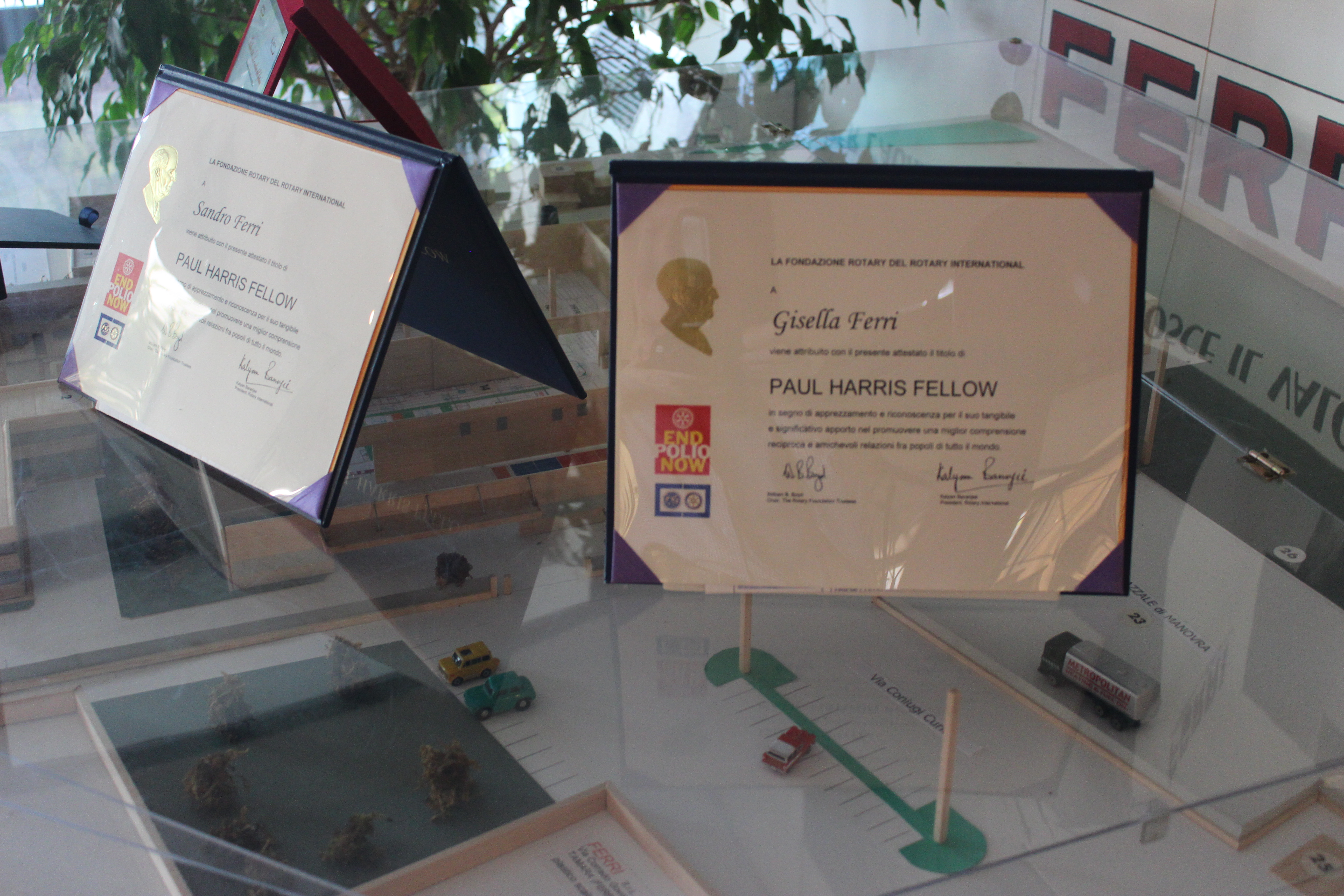 Премия, врученная Сандро Ферри (Sandro FERRI) и Жизель Ферри (Gisella Ferri) в знак признательности и благодарности за ощутимый и значительный вклад в содействие лучшему взаимопониманию и дружбе между народами по всему миру.